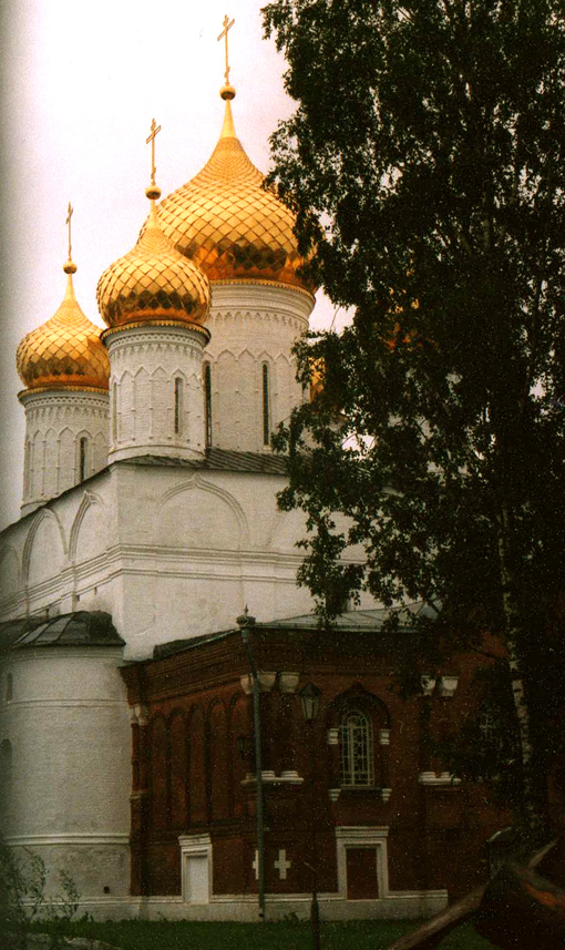 Bogojavlensky_Monastery's Bogojavlensky_sobor in Kostroma